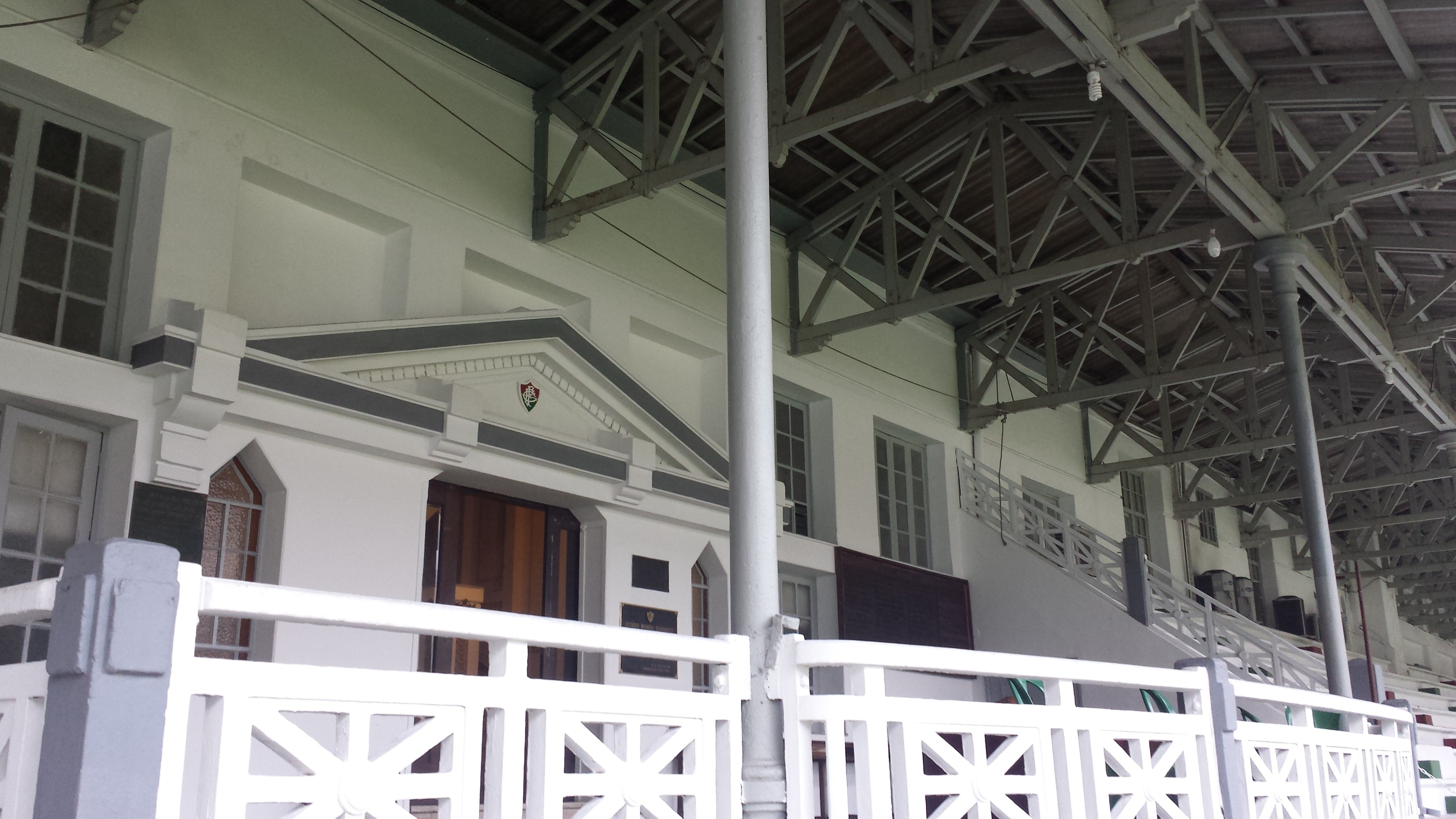 Tribuna de Honra do Estádio de Laranjeiras (FFC) em 2016.